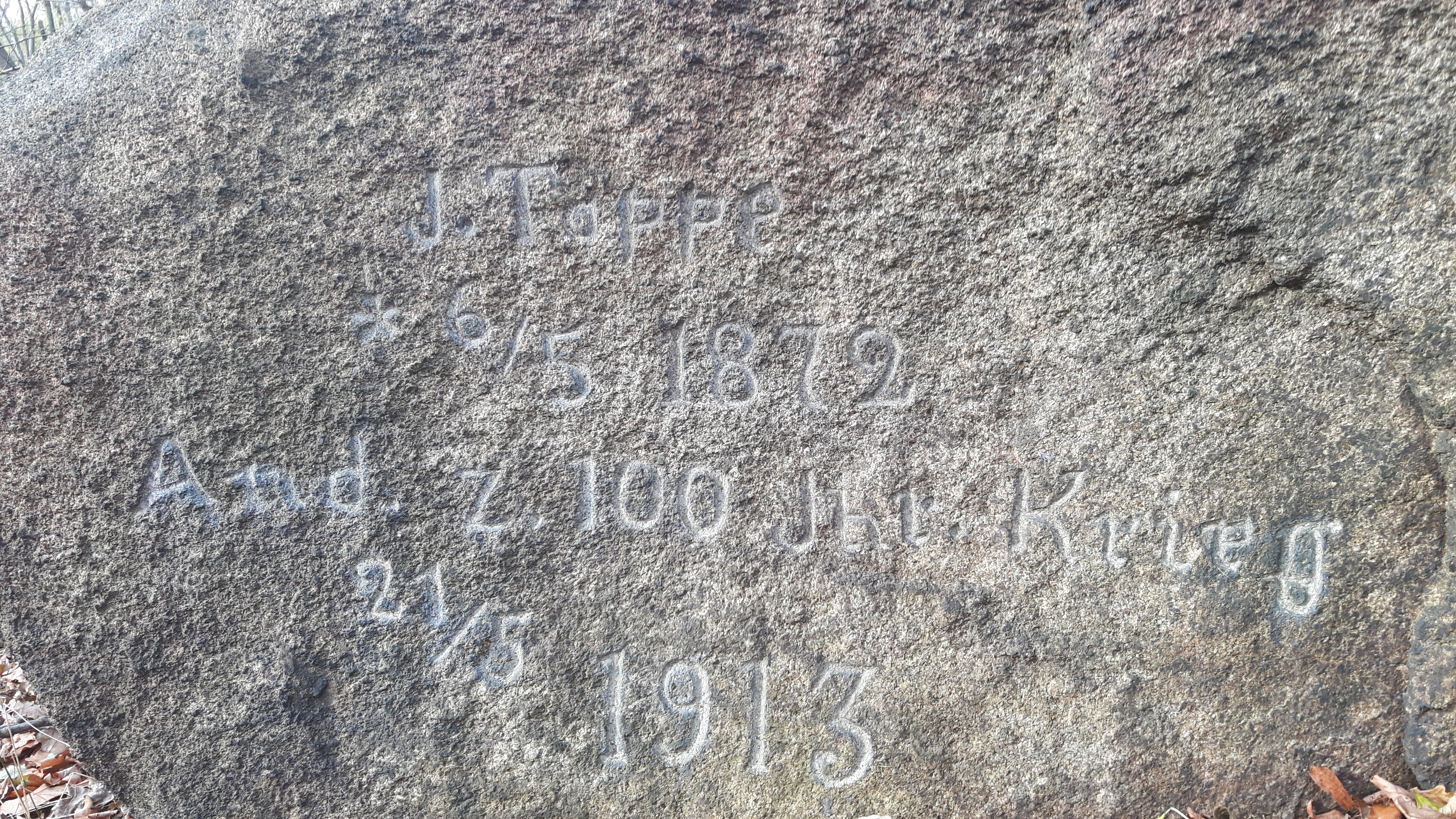 Die Inschrift an einem Felsen auf dem Mittelberg der Kreckwitzer Höhen zum Andenken an die Schlacht vom 21.05.1813.